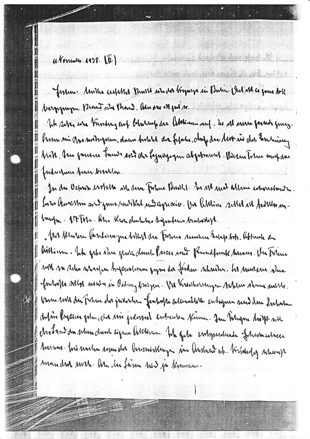 Tagebucheinträge Joseph Goebbels vom 10. und 11. November 1938. texte: 11. November 1938. (Fr.) Gestern: Müller erstattet Bericht über die Vorgänge in Berlin. Dort ist es ganz toll hergegangen. Brand über Brand. Aber das ist gut so. Ich setze eine Verordnung auf Abschluß der Aktionen auf. Es ist nun gerade genug. Lassen wir das weitergehen, dann besteht die Gefahr, daß der Mob in die Erscheinung tritt. Im ganzen Lande sind die Synagogen abgebrannt. Diesen Toten muß das Judentum teuer bezahlen. In der Osteria erstatte ich dem Führer Bericht. Er ist mit allem einverstanden. Seine Ansichten sind ganz radikal und agressiv. Die Aktion selbst ist tadellos verlaufen. 17 Tote. Aber kein deutsches Eigentum beschädigt. Mit kleinen Änderungen billigt der Führer meinen Erlaß betr. Abbruch der Aktionen. Ich gebe ihn gleich durch Presse und Rundfunk heraus. Der Führer will zu sehr scharfen Maßnahmen gegen die Juden schreiten. Sie müssen ihre Geschäfte selbst wieder in Ordnung bringen. Die Versicherungen zahlen ihnen nichts. Dann will der Führer die jüdischen Geschäfte allmählich enteignen und den Inhabern dafür Papiere geben, die wir jederzeit entwerten können. Im Übrigen hilft sich das Land da schon durch eigene Aktionen. Ich gebe entsprechende Geheimerlasse heraus. Wir warten nun die Auswirkungen im Ausland ab. Vorläufig schweigt man dort noch. Aber der Lärm wird ja kommen.